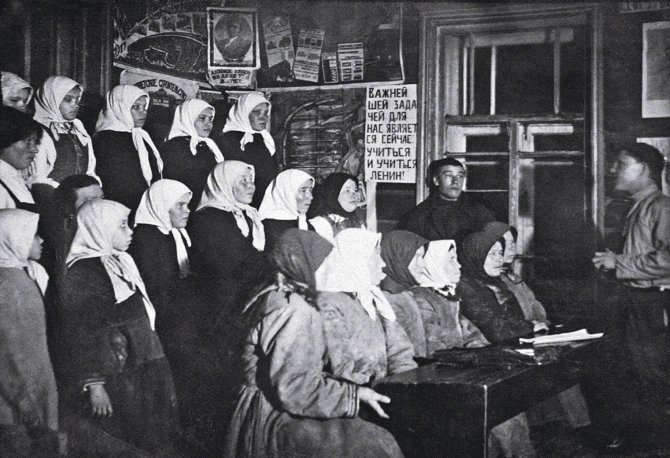 Обучение населения чтению и письму в деревне Шоркасы (Чебоксарский район) [1].